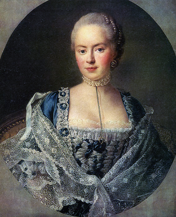 графиня Дарья Петровна Чернышёва, в замужестве Салтыкова (1739 - 1802)